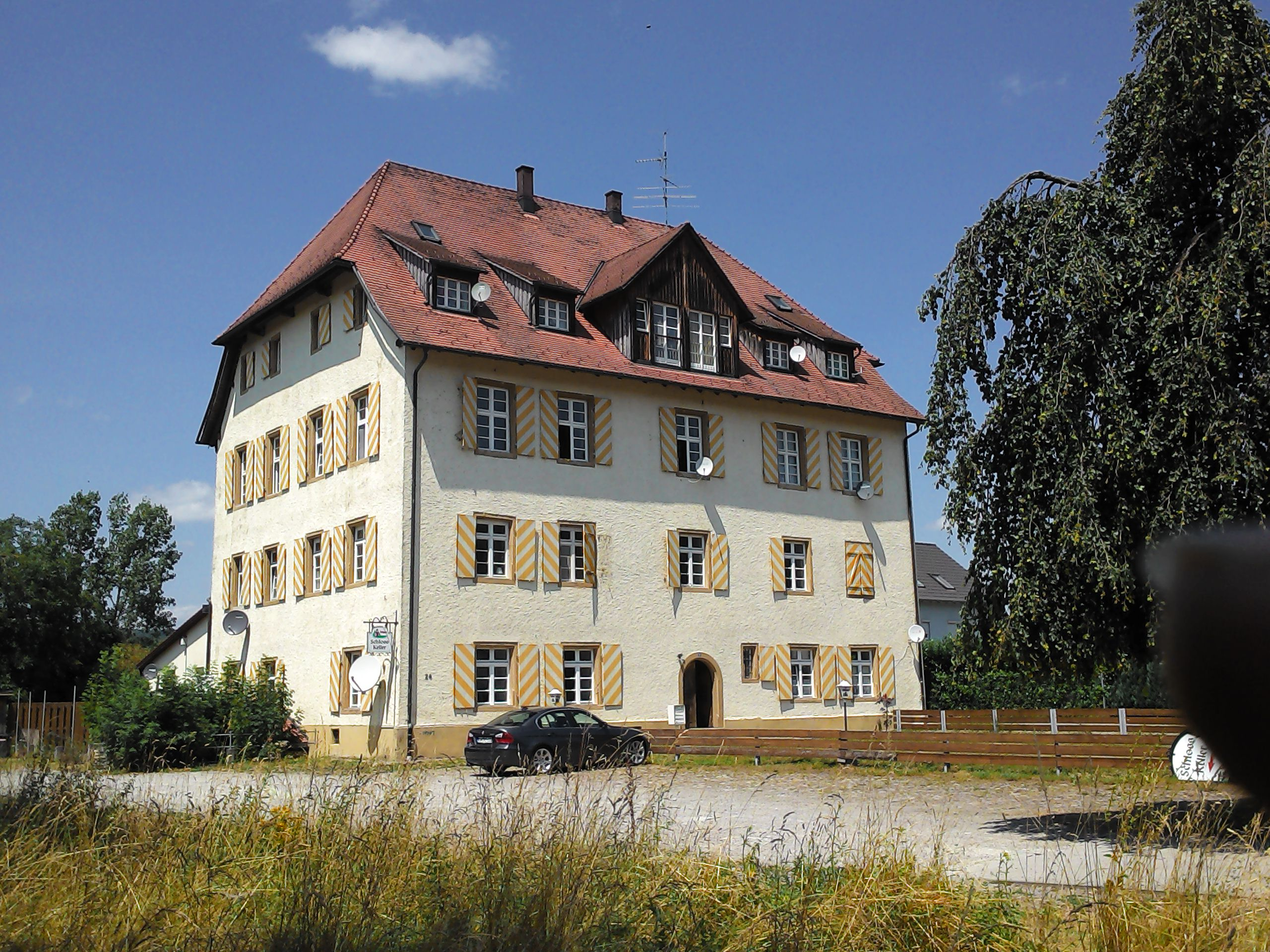 Wutöschingen, Schwerzen-Willmendingen, ehemaliges Schloss, heute umgebaut zum Wohnhaus.